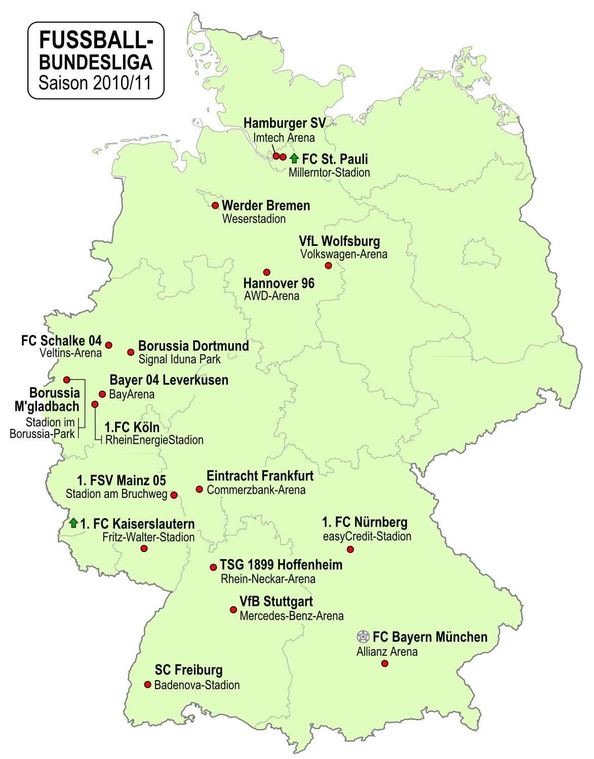 Karte der Vereine der Fußball-Bundesliga-Saison 2010/2011